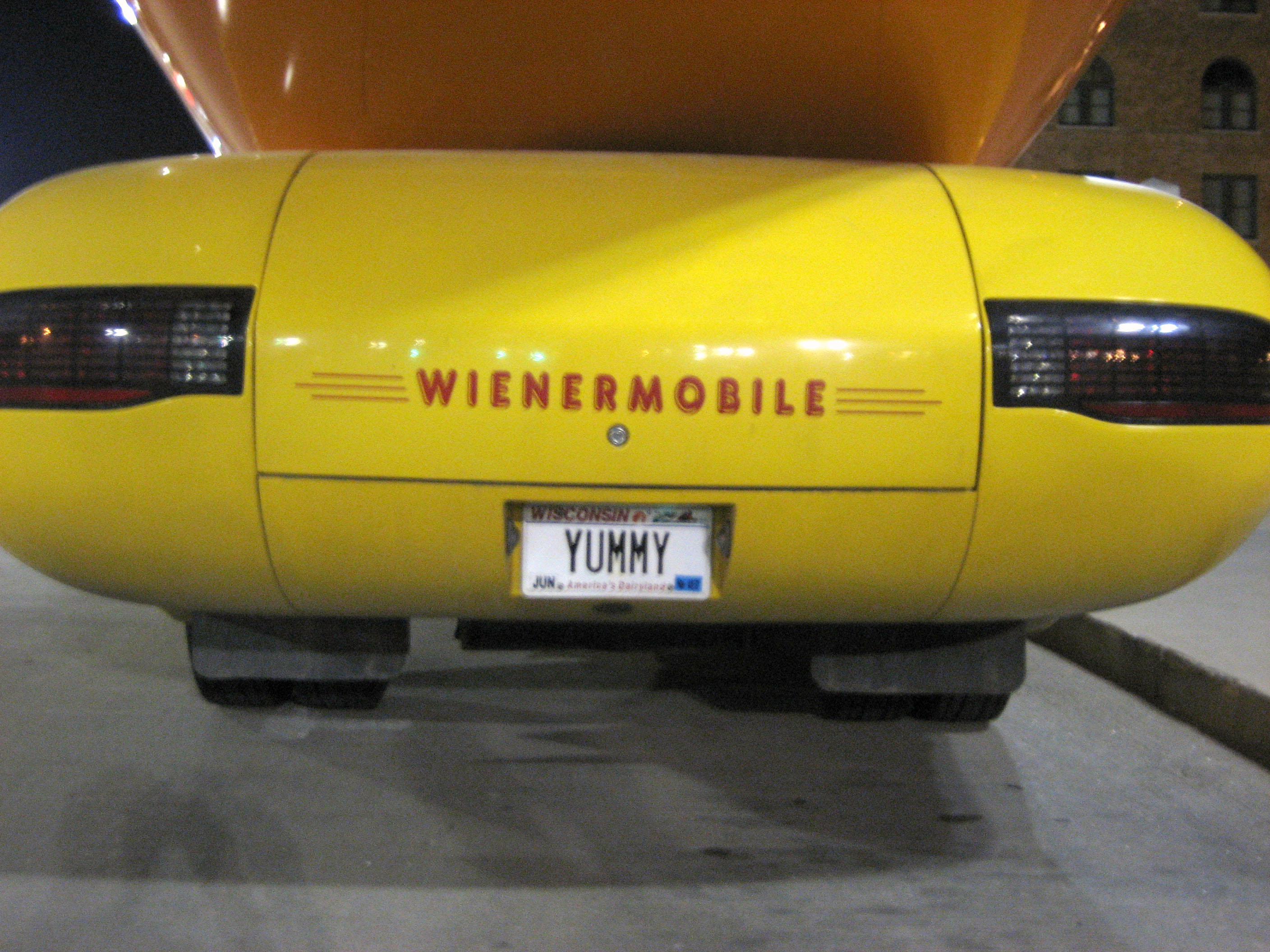 Taken by Ryan Durham in Omaha, NE in 2006.